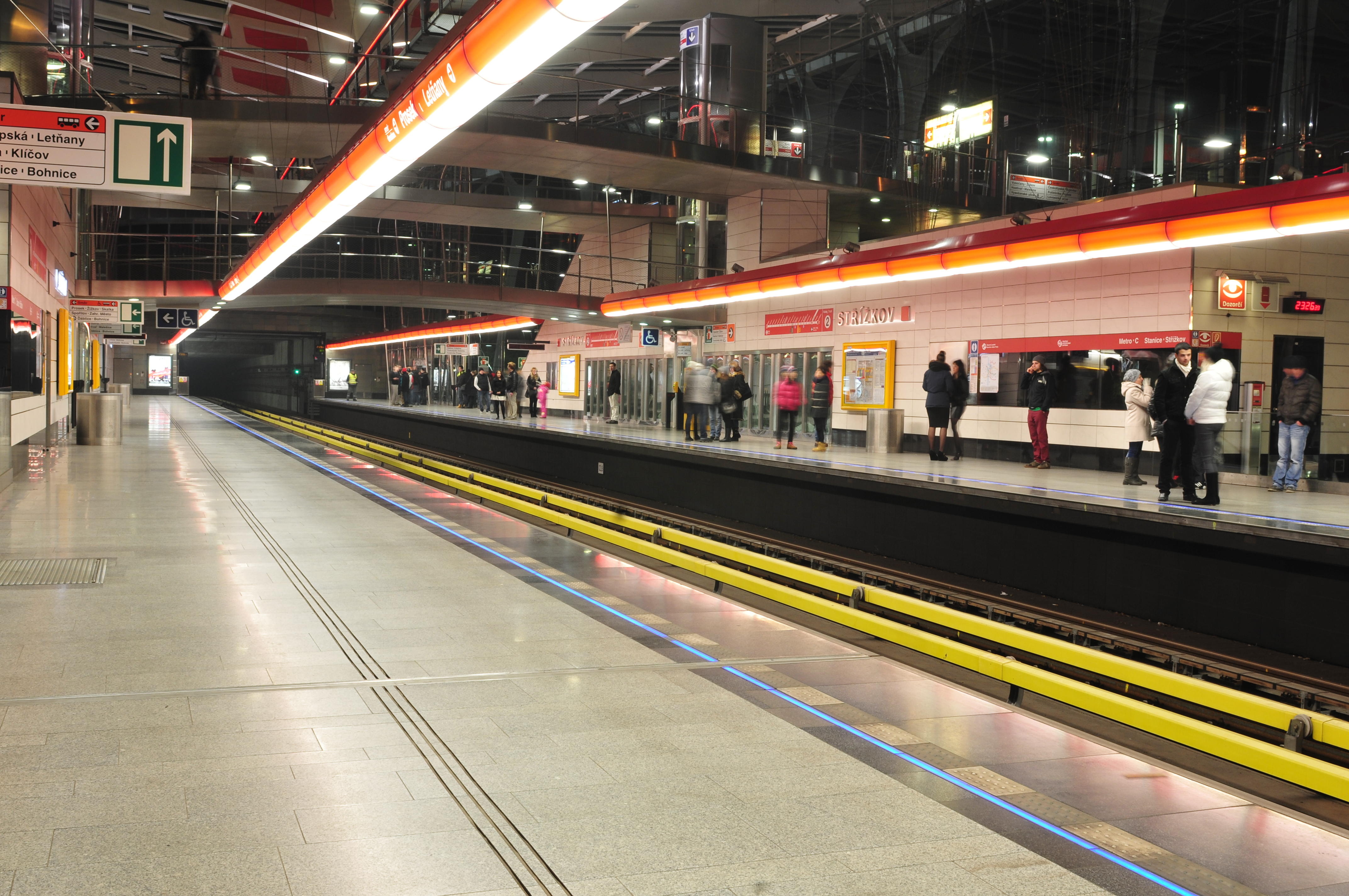 Metro Praha